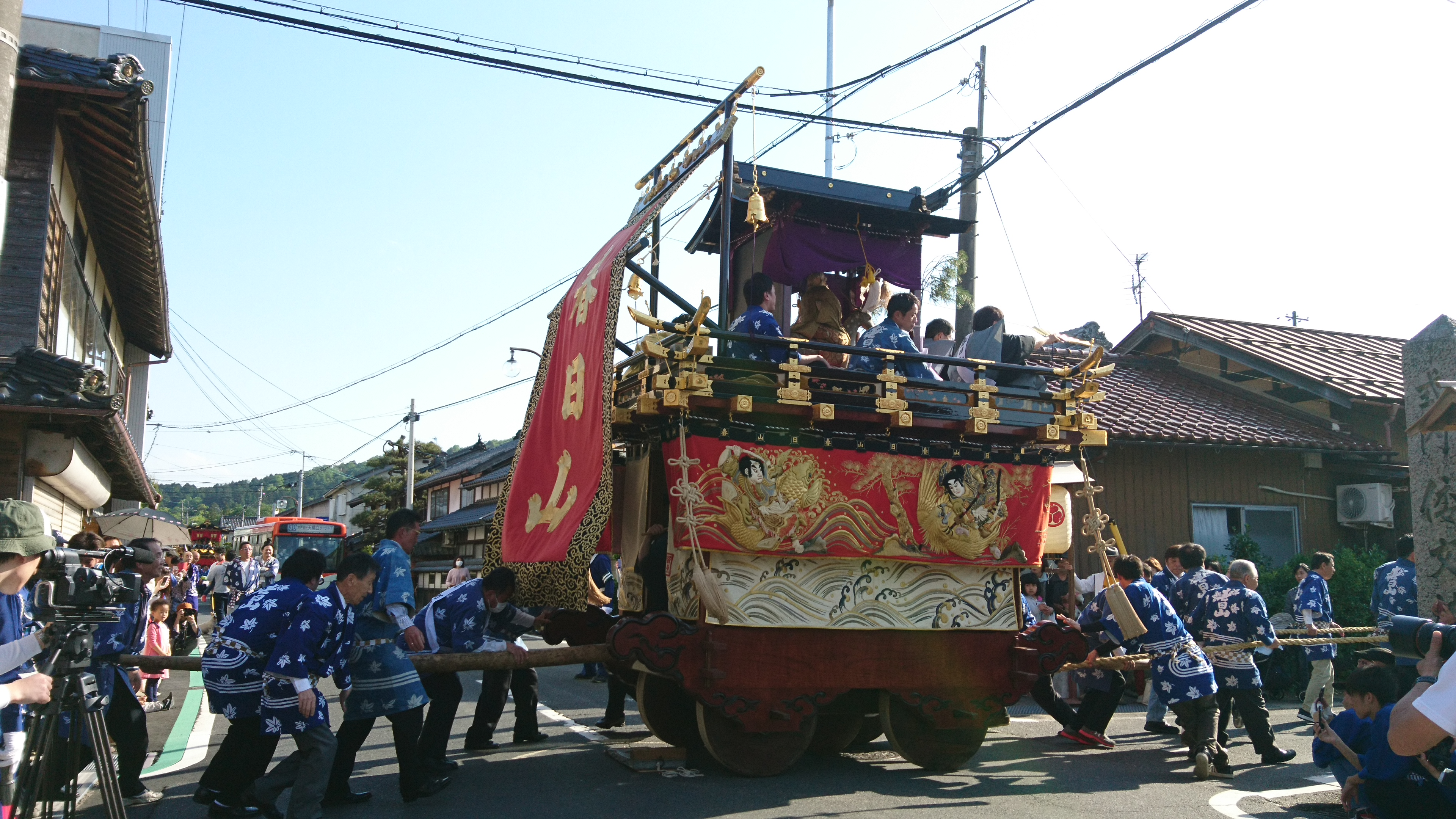 三河内曳山祭巡行 参道へ入る